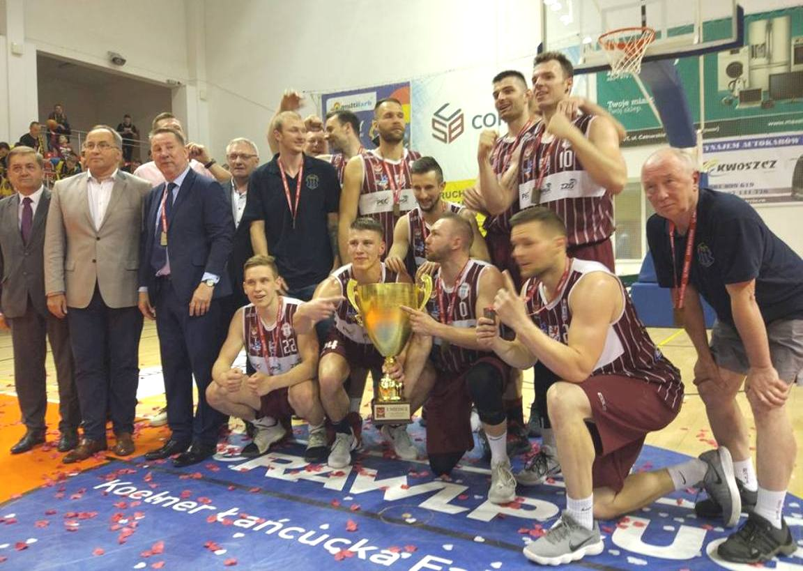 Puchar i złoty medal dla Spójni (17.05.2018)